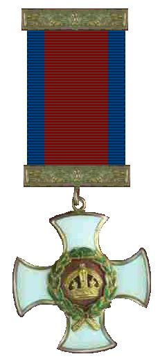 Collage met de juiste gesp aan de bovenzijde van het lint